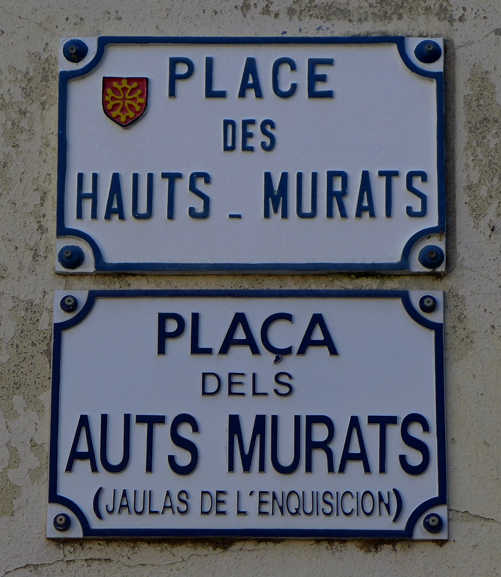 Place des Hauts-Murats (Toulouse) - plaques de rue